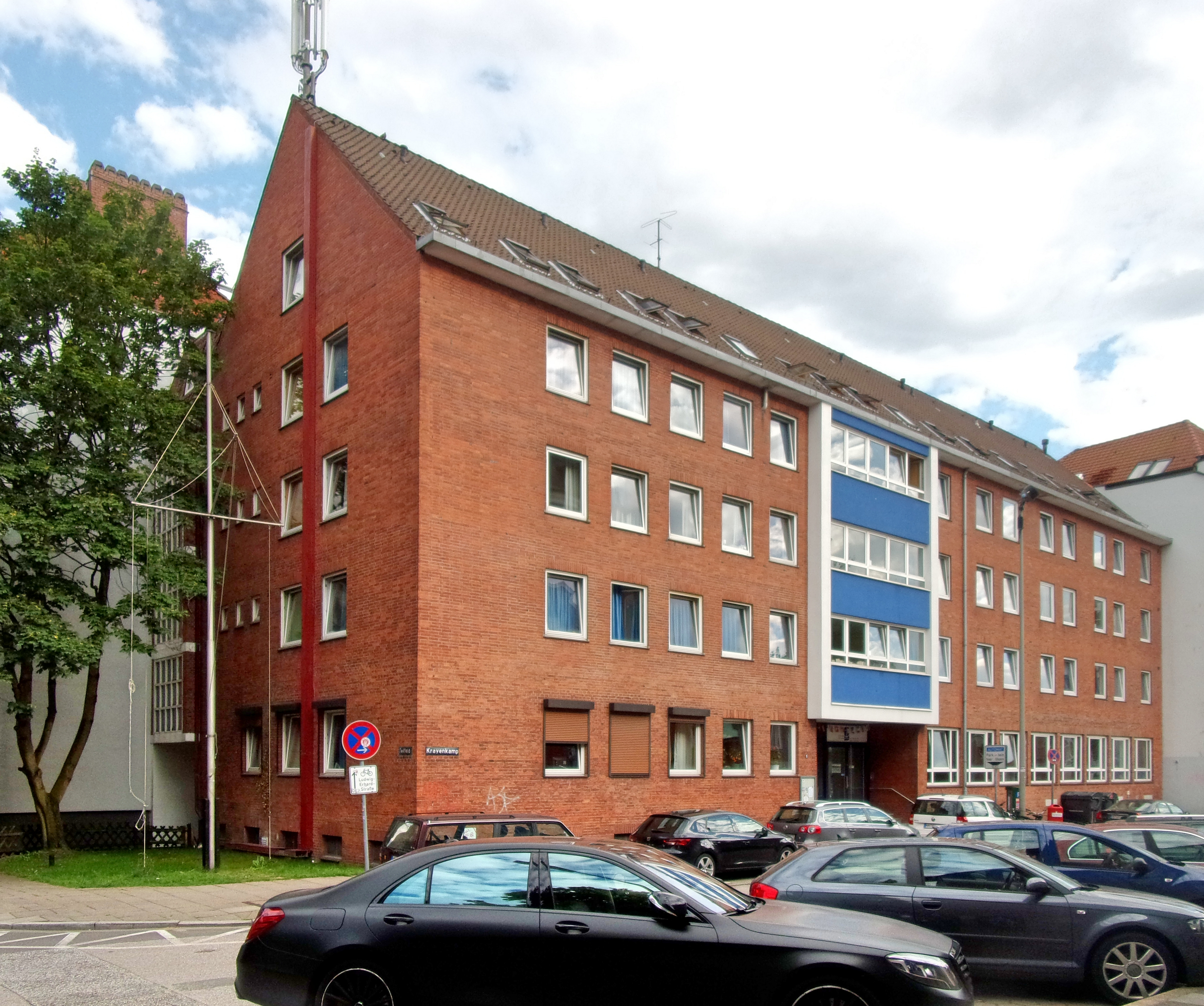 Deutsche Seemannsmission in Hamburg e. V. am Krayenkamp 5 in Hamburg-Neustadt. Anlaufstelle für Seeleute, Seemannsheim, Hotel und Restaurant.